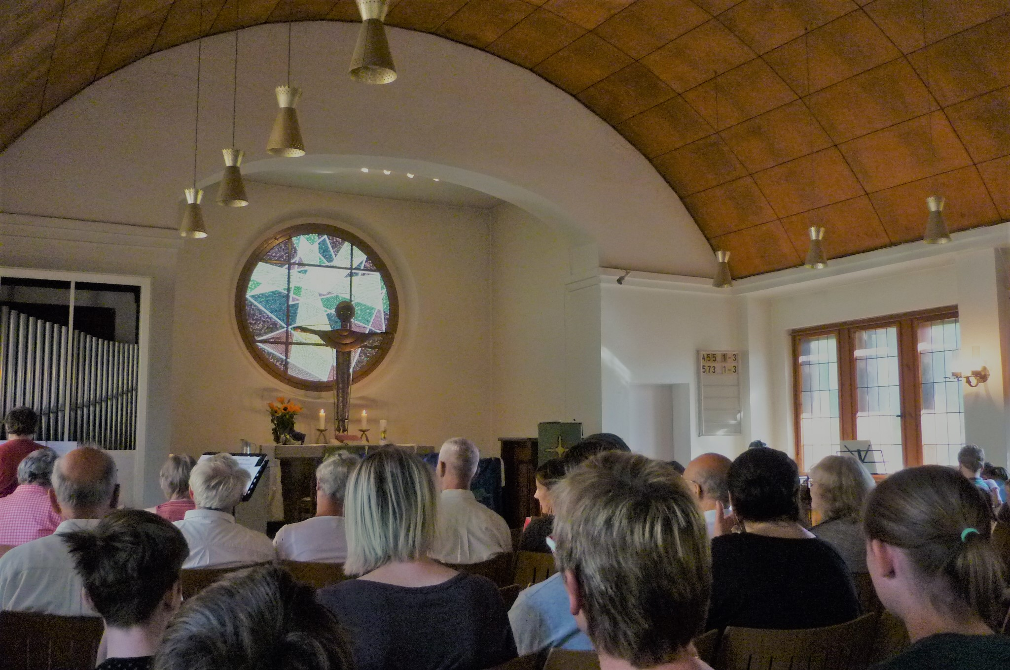 Gemeindezentrum Albert Schweitzer, Innenraum